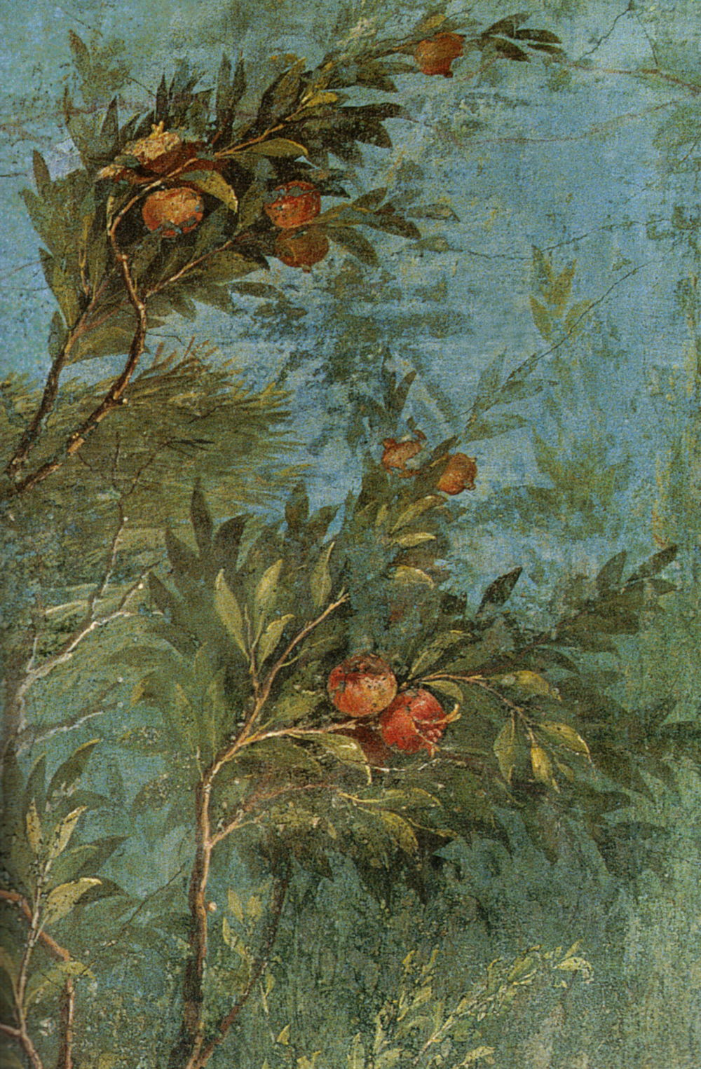 Villa di livia, affreschi di giardino, parete corta meridionale, melograno (dettaglio)